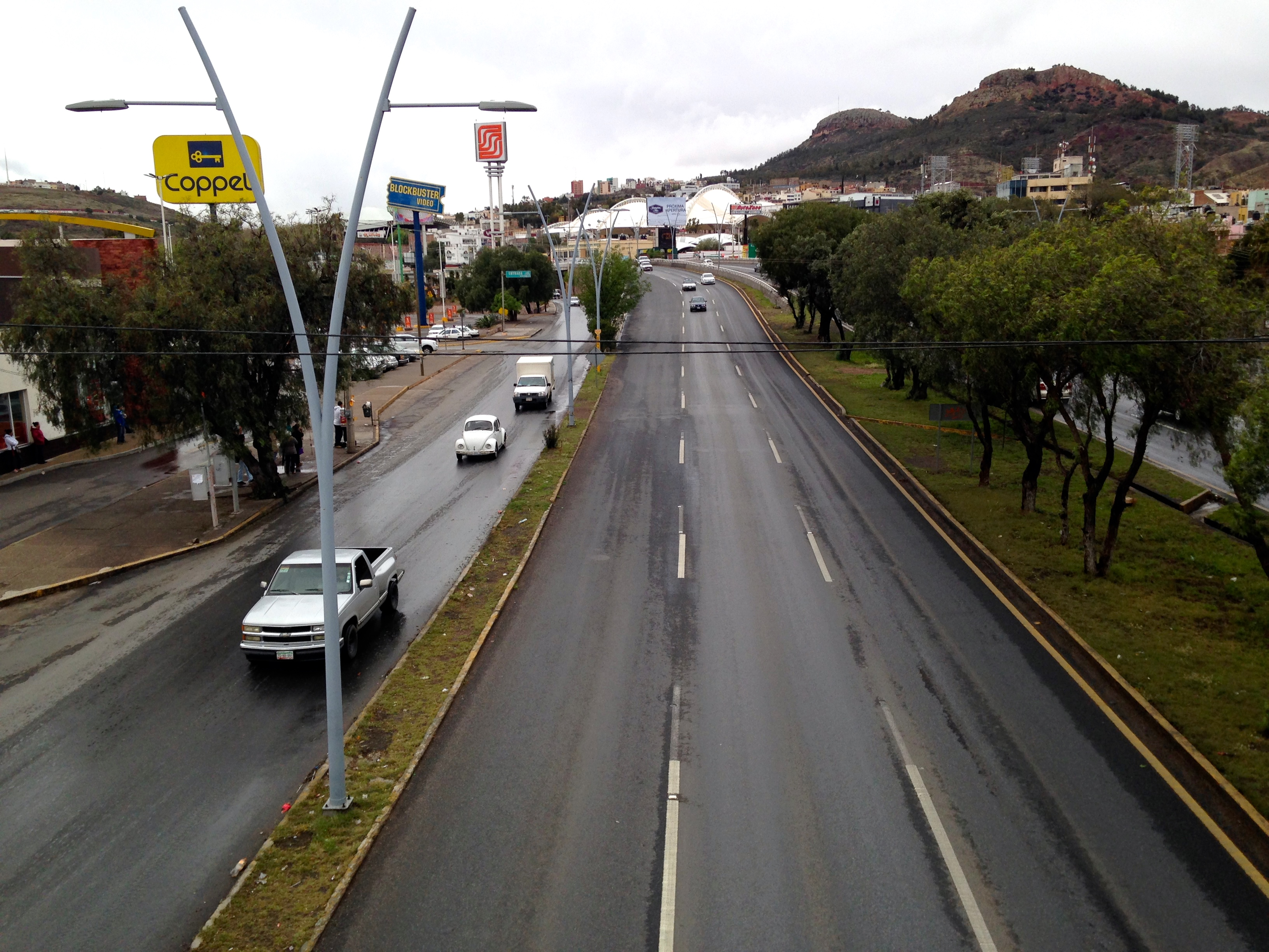 Vista del boulevar Adolfo Lopez Mateos de Zacatecas